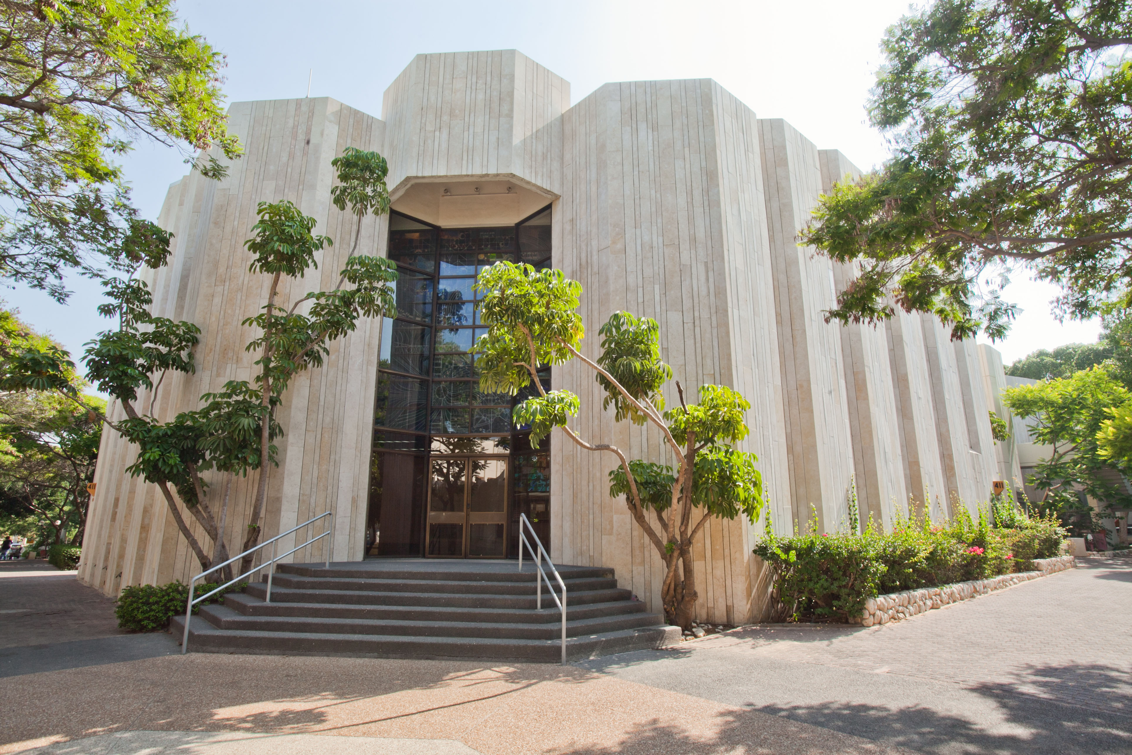 machon1 411